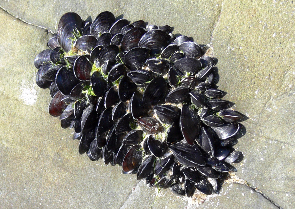 moules en train de coloniser un rocher battu par les vagues. Photo prise au sud de la Plage du Goulien (Finistère, Bretagne, Ouest de la France, Europe).